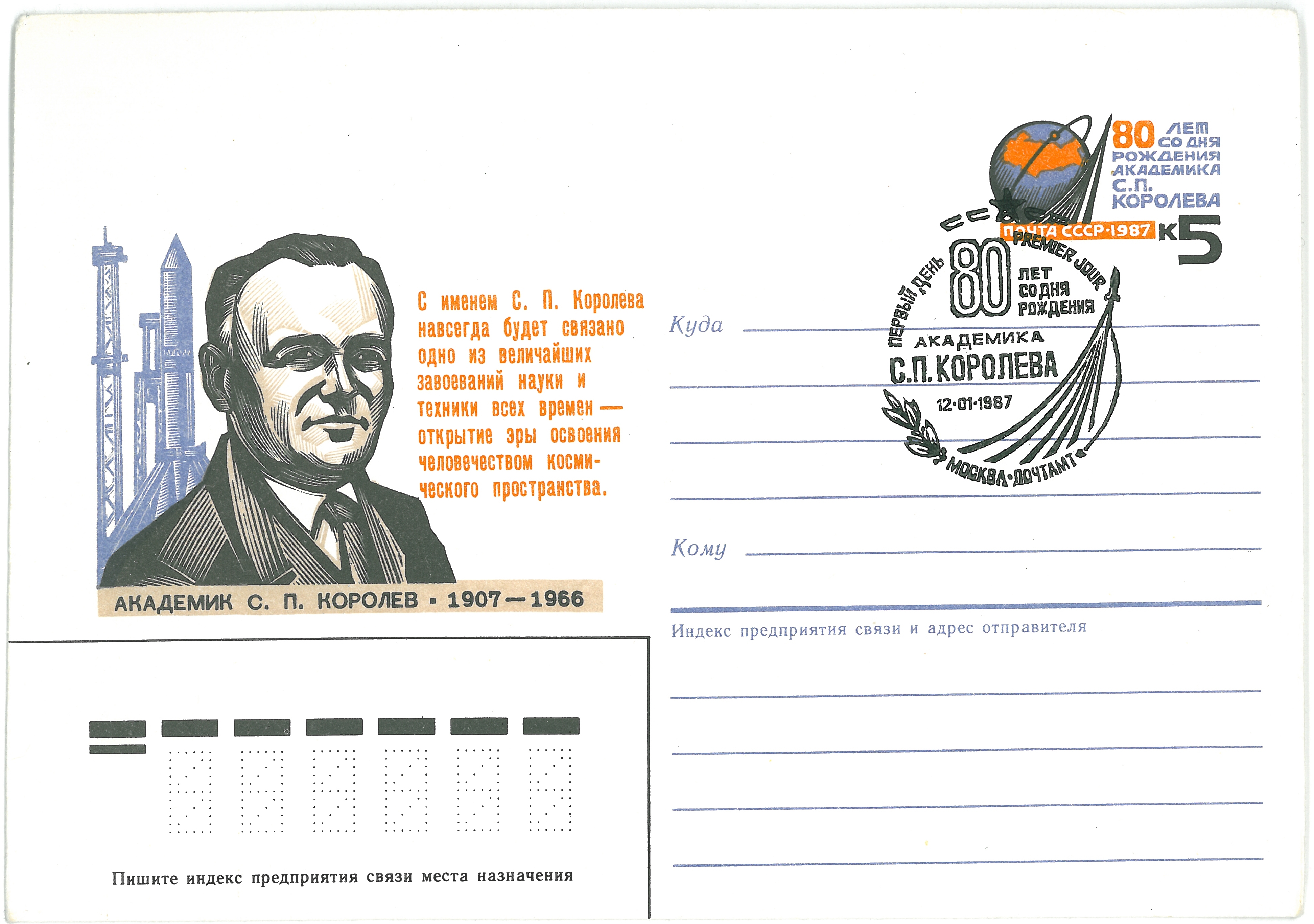 Korolev Sergej, USSR original stamp, 1987 Сергей Павлович Королёв (1907-1966). 80 лет со дня рождения . Оригинальная почтовая марка номиналом 5 копеек (авиа тариф) с маркированного почтового конверта СССР. 1987 год. Дата подписания в печать - ... 1986. Гашение первого дня - 12 января 1987 года, Москва, Главпочтамт.